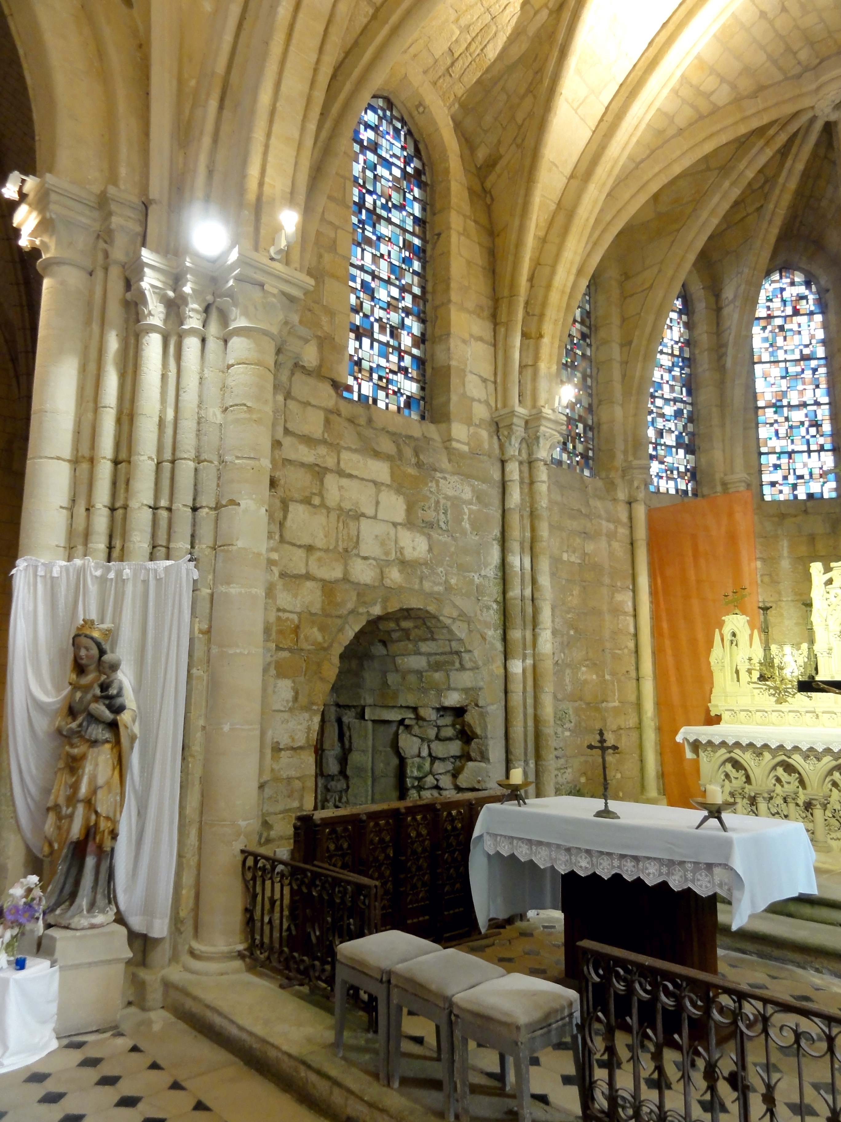 Intérieur de l'église - voir titre.